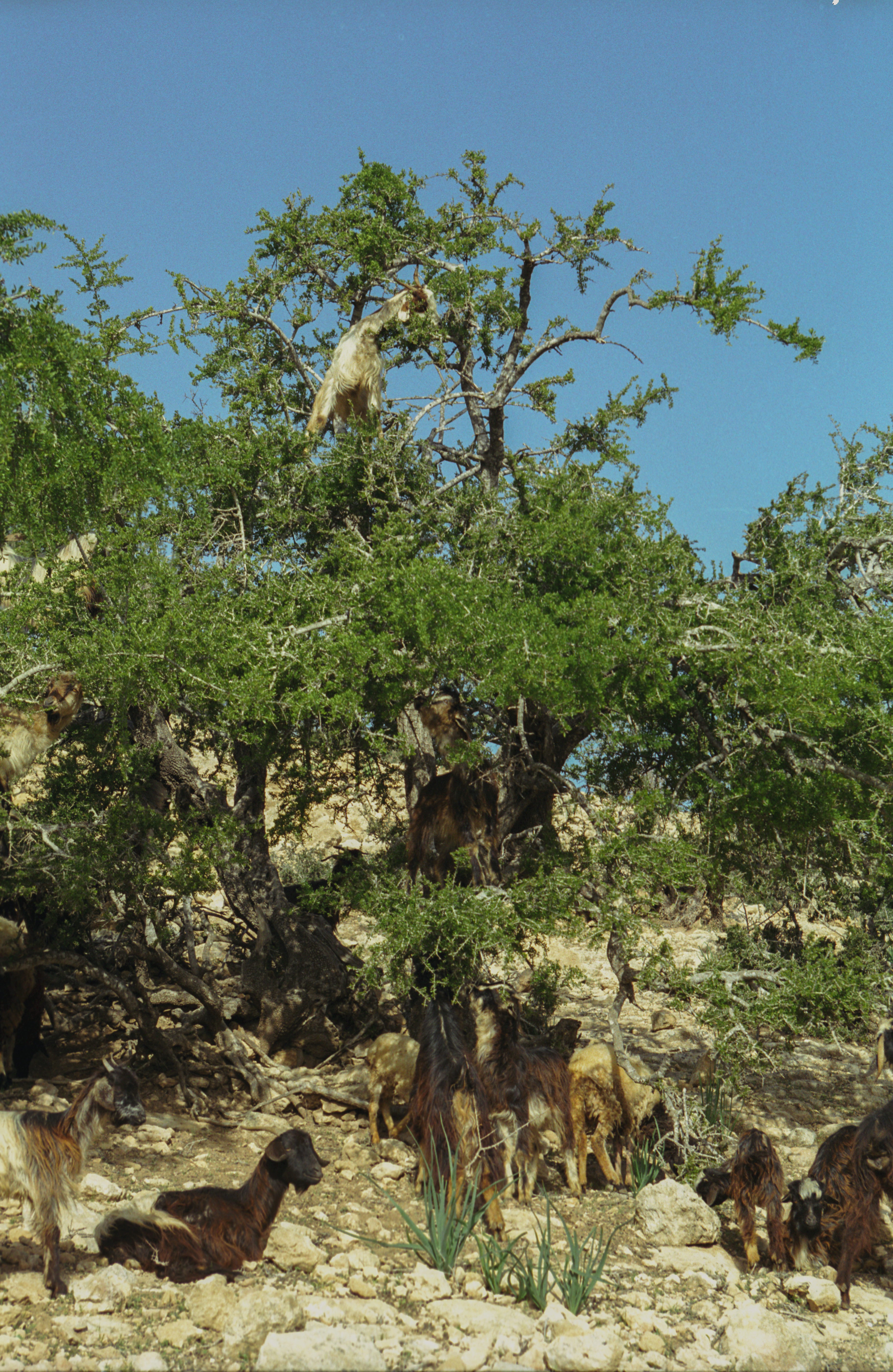 Kozy na drzewie arganii żelaznej